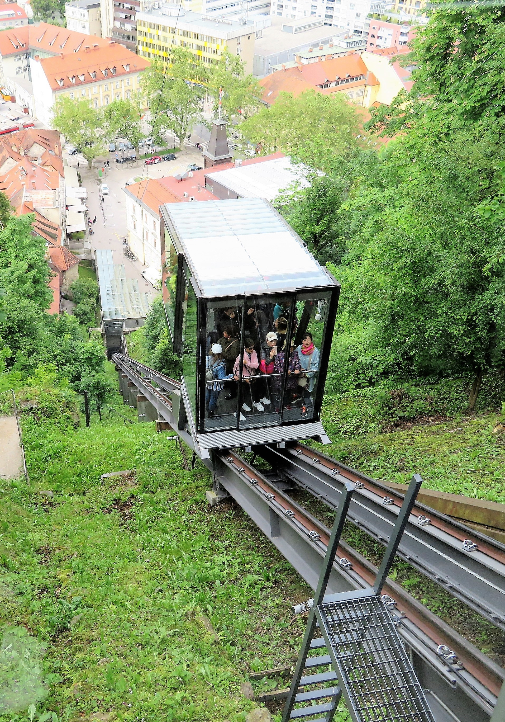 Funicular in Ljubljana, SlovenIë naar het Llubljana Castle. In 2006 in gebruik genomen. Ontworpen door Miha Kerin and Majda Kregar van de Ambient design studio.